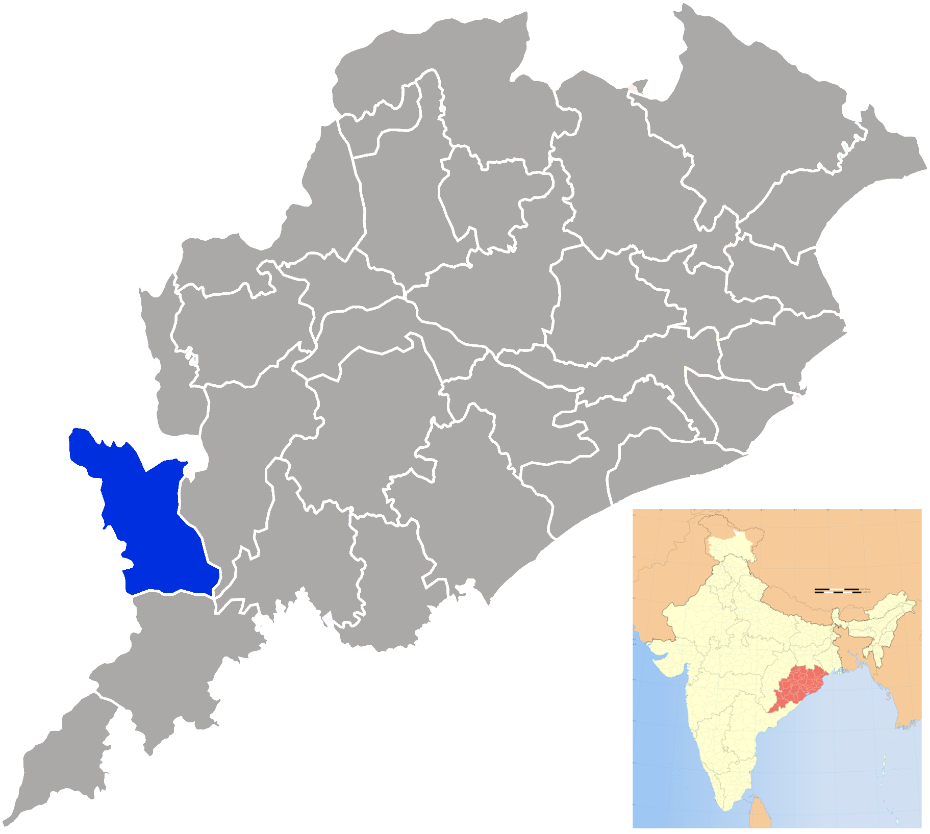 Distrito de Nabarangpur en Orissa